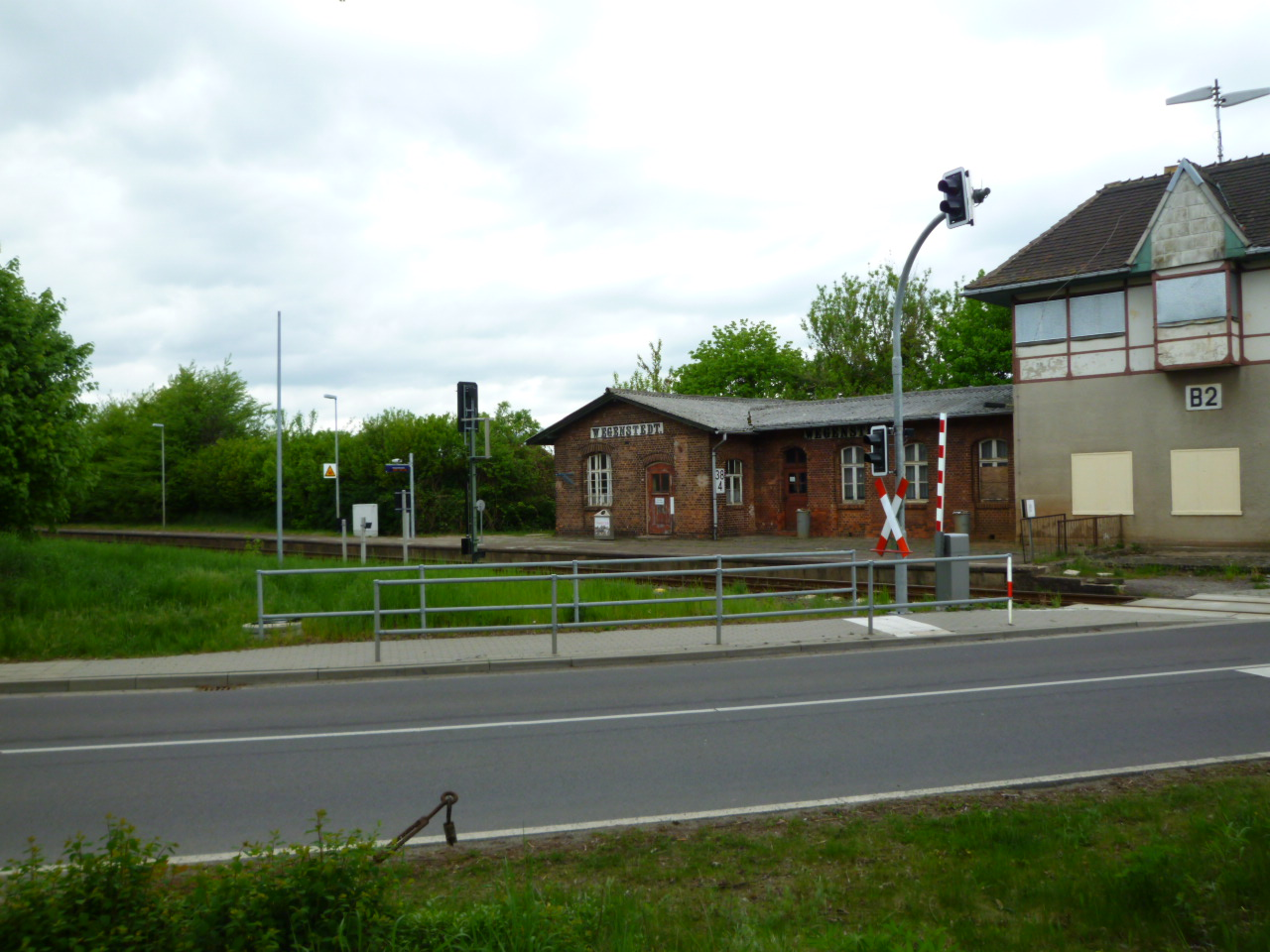 Der Calvörder Bahnhof Wegenstedt im Mai 2012, vor den geplanten Bauarbeiten 2012